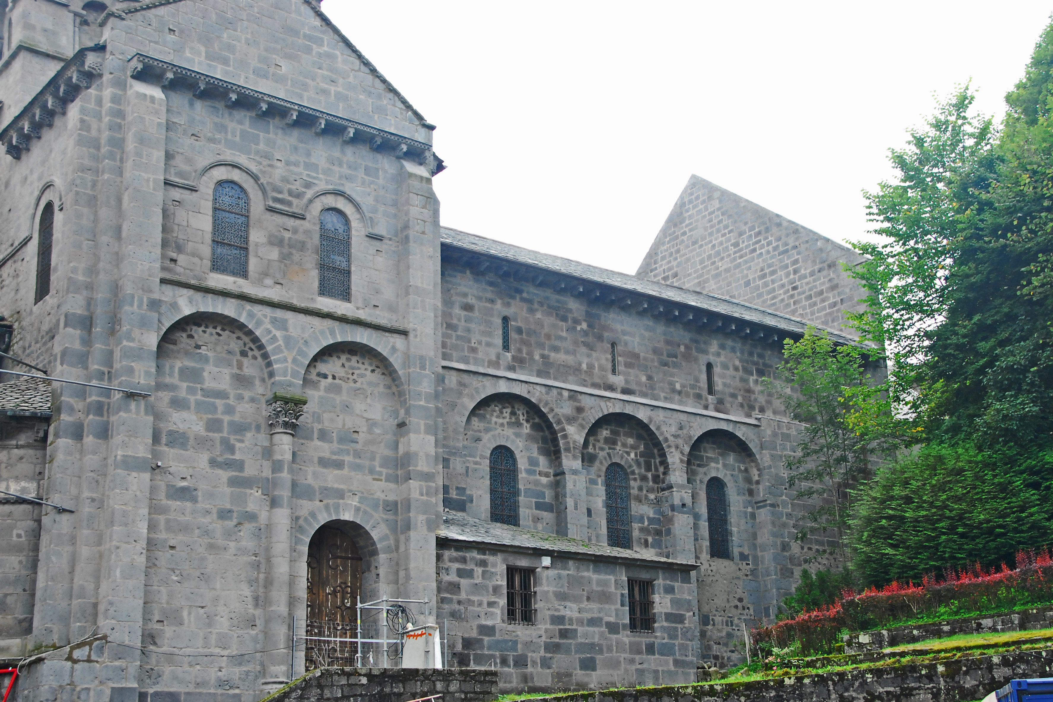 N.-D.d'Orcival, Quer- u. Langhaus von N